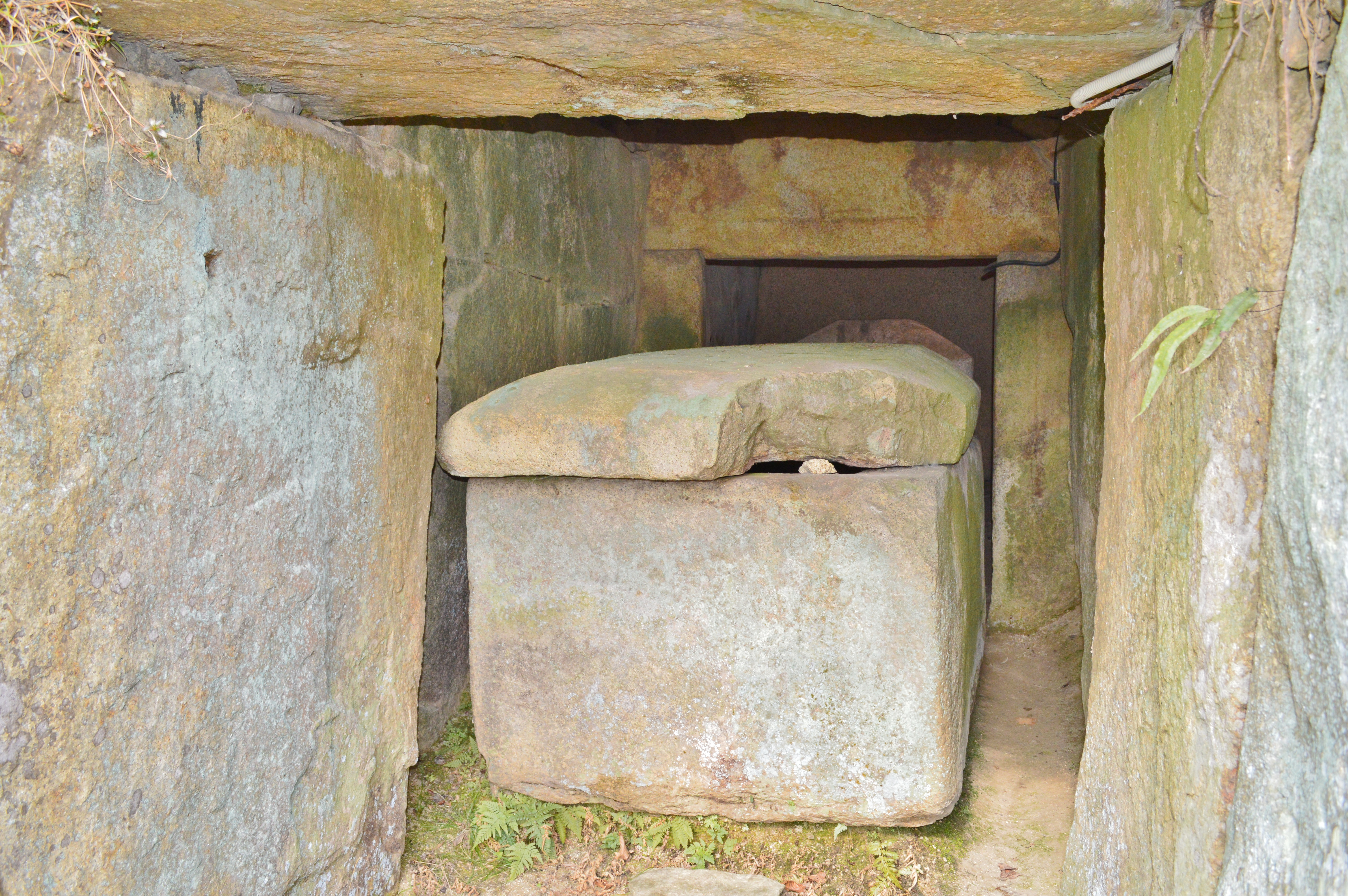 御年代古墳 前室 Nikon D3200